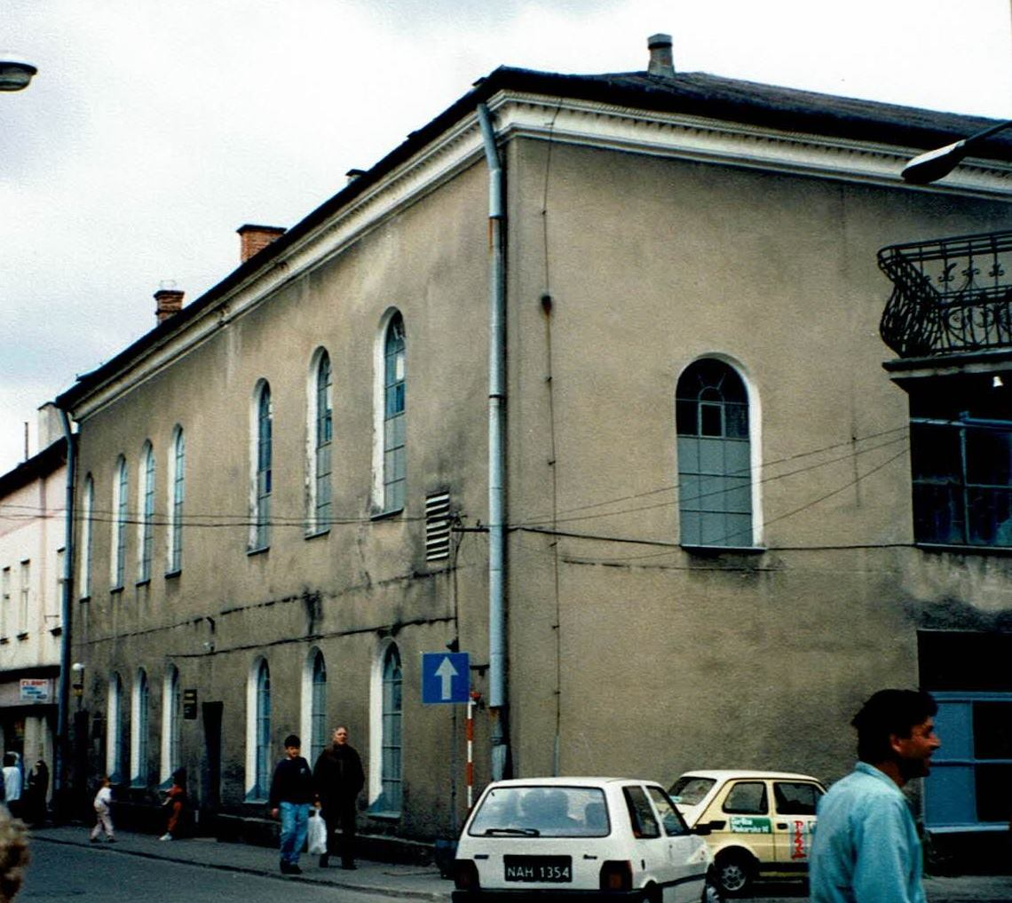 בית הכנסת בשנת 1996, כאשר המבנה שימש כמאפיה